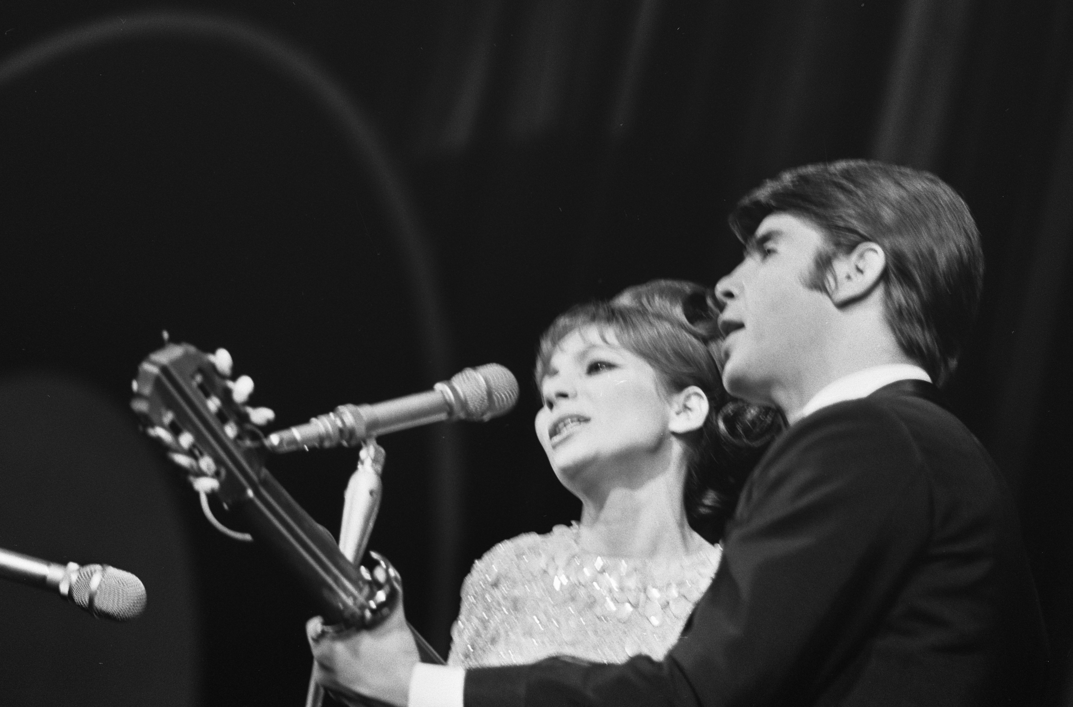 Collectie / Archief : Fotocollectie Anefo Reportage / Serie : [ onbekend ] Beschrijving : Grand Gala du Disque 1965 , Esther en Abraham Ofarim Datum : 2 oktober 1965 Locatie : Amsterdam Trefwoorden : muziek, muziekprijzen, zangers Persoonsnaam : Ofarim, Abi, Ofarim, Esther Fotograaf : Koch, Eric / Anefo Auteursrechthebbende : Nationaal Archief Materiaalsoort : Negatief (zwart/wit) Nummer archiefinventaris : bekijk toegang 2.24.01.05 Bestanddeelnummer : 918-2585